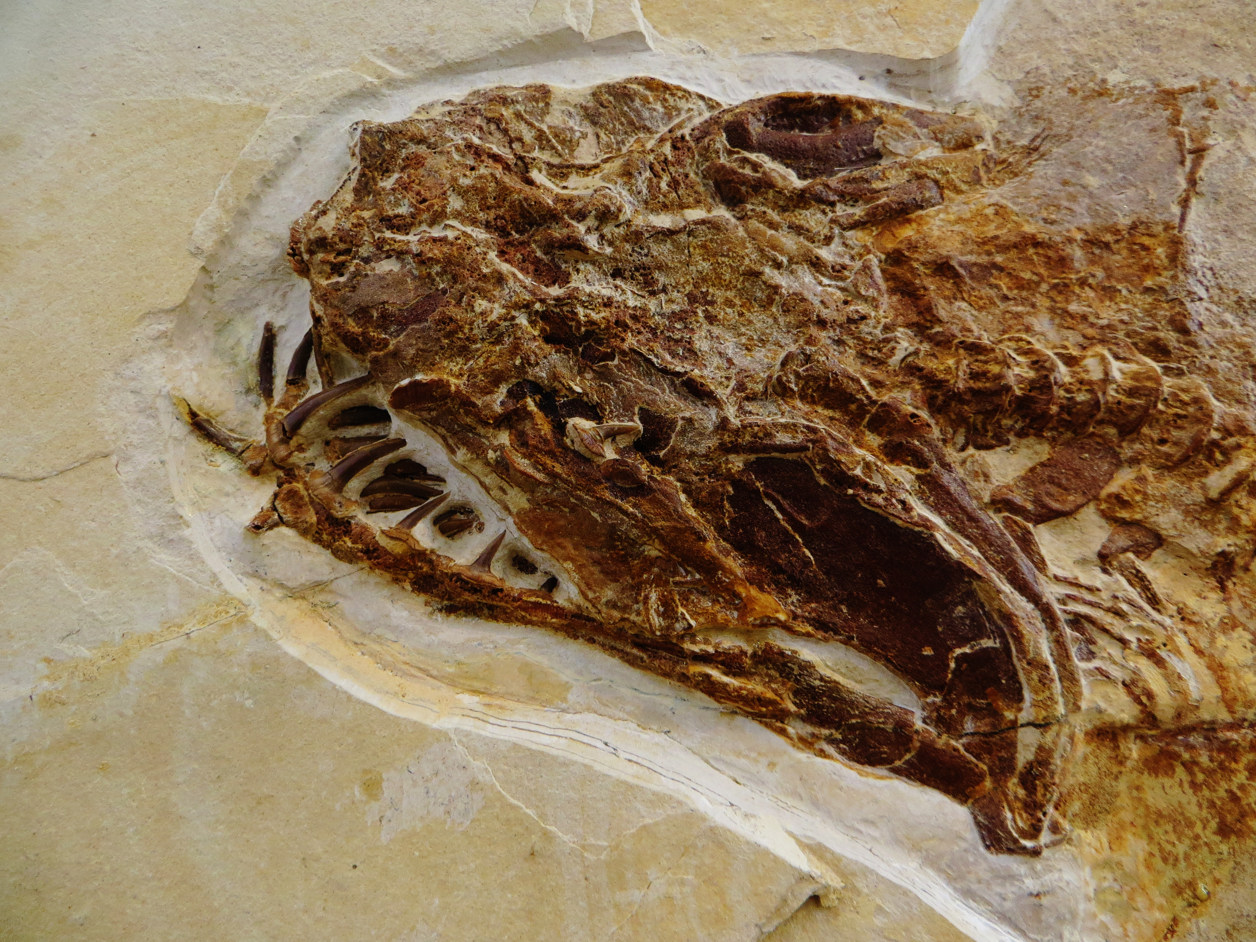 Took the picture at Jura-Museum, Eichstaett